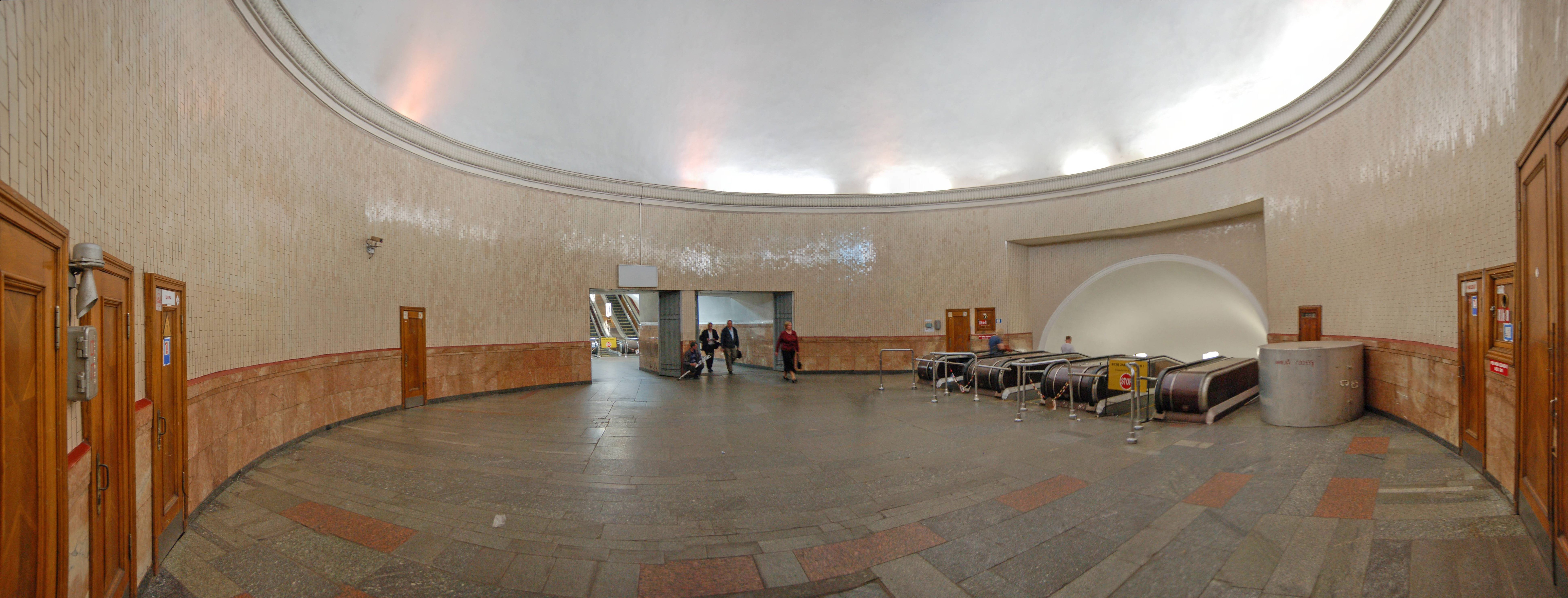 Станция метро «Арсенальная», промежуточный вестибюль эскалаторного наклона